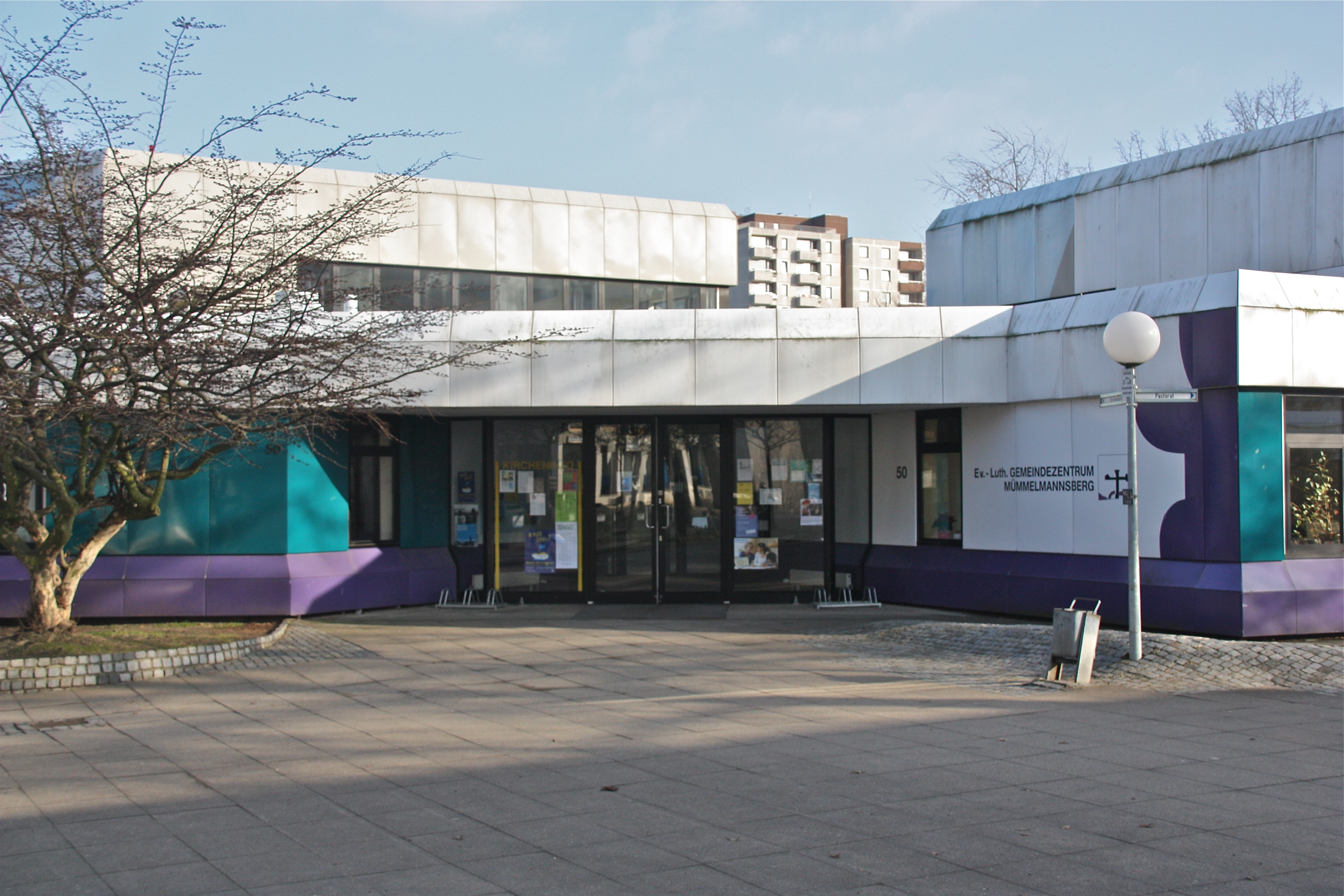 Hamburg, Billstedt, Mümmelmannsberg, Evangelisches Gemeindezentrum, Eingang am Havighorster Redder